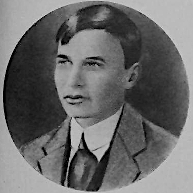 Lékai János (szül. Leitner) írói álnevein: Köres, Lassen János, John Lassen (Varasd, 1895. június 17. – New York, 1925. július 17.) magyar író, újságíró, lapszerkesztő, politikus, publicista, magánhivatalnok, aki szélsőbaloldali ügynökként sikertelen merényletet hajtott végre Tisza István ellen.